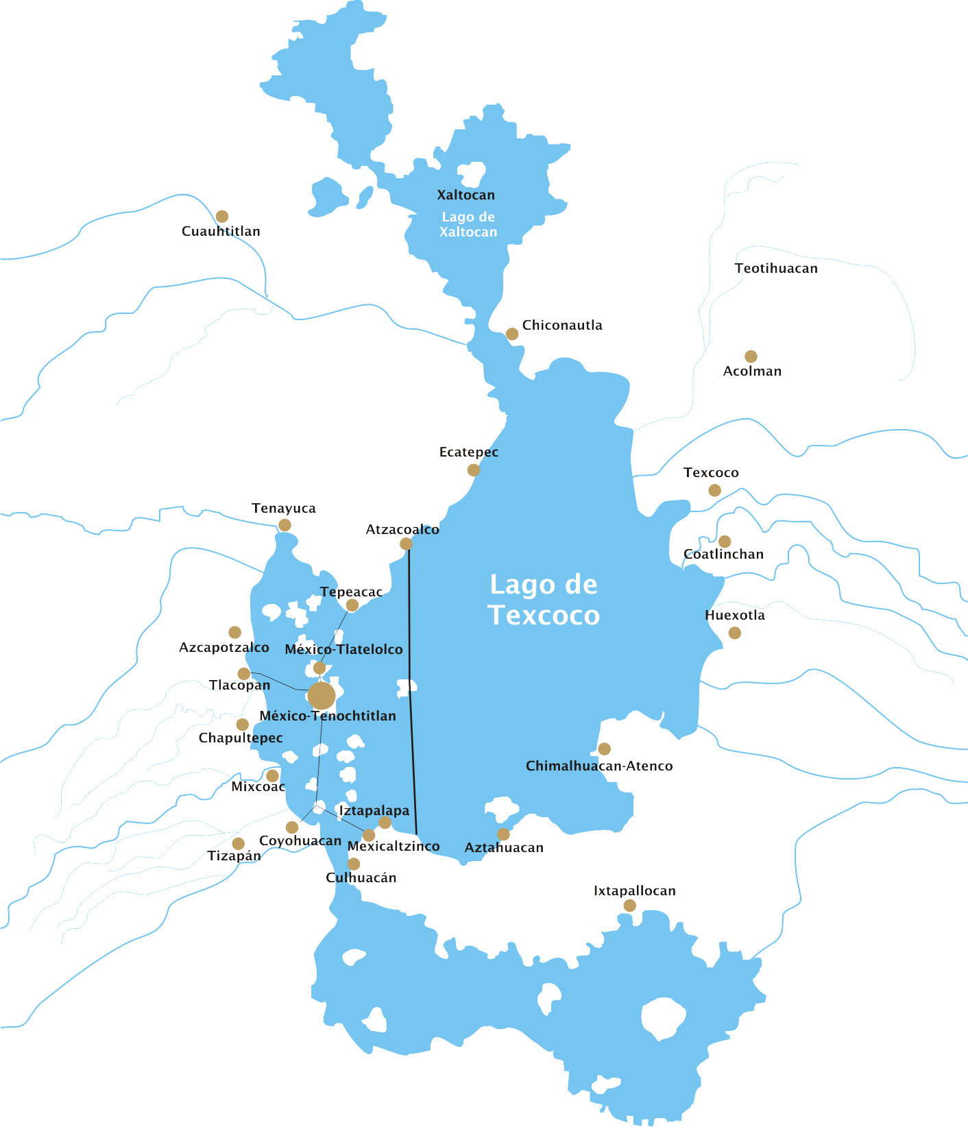 Mapa de la cuenca de México a la llegada de los españoles